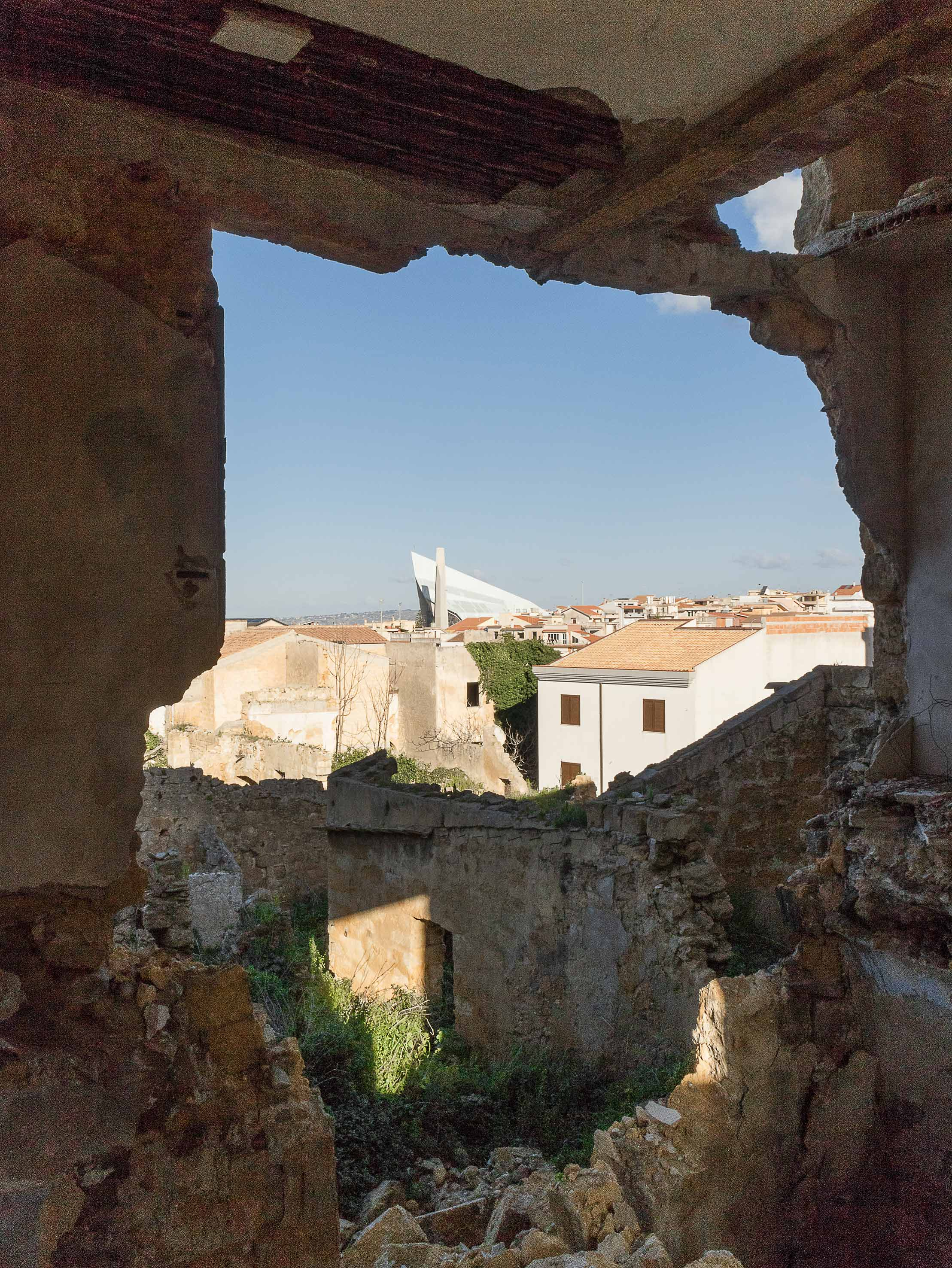 Vista della Chiesa Madre dai ruderi della città antica